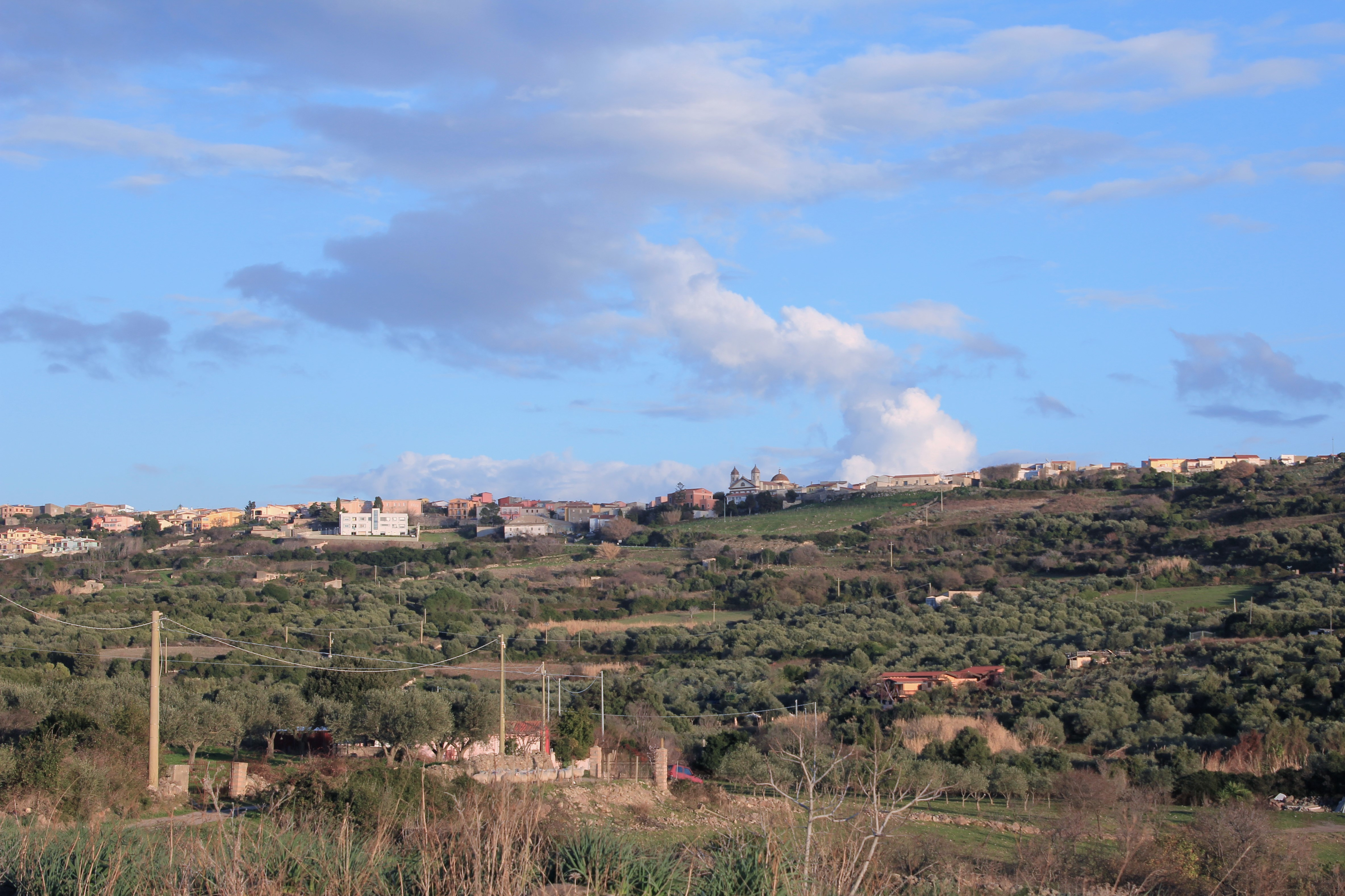 Tresnuraghes, panorama